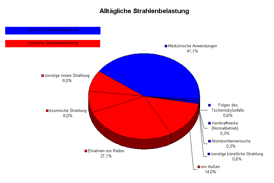 Arten der natürlichen Strahlenbelastung, Bild wurde von mir erstellt, die Daten stammen aus dem Buch "Physik für Gymnasien", Cornelsen. Das Bild stelle ich hiermit unter die GNU FDL.